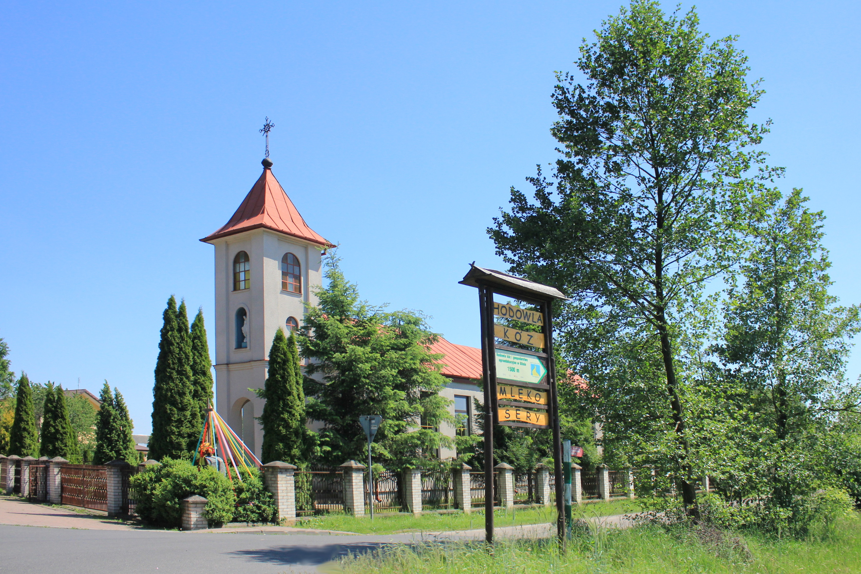 Kaplica we wsi Glina położonej w województwie mazowieckim, w powiecie ostrowskim, w gminie Małkinia Górna